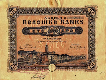 Акция на Велешката банка.